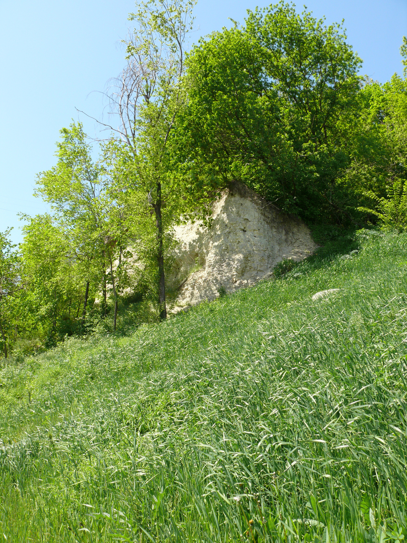 Zhuravljovsky slope in Kharkov